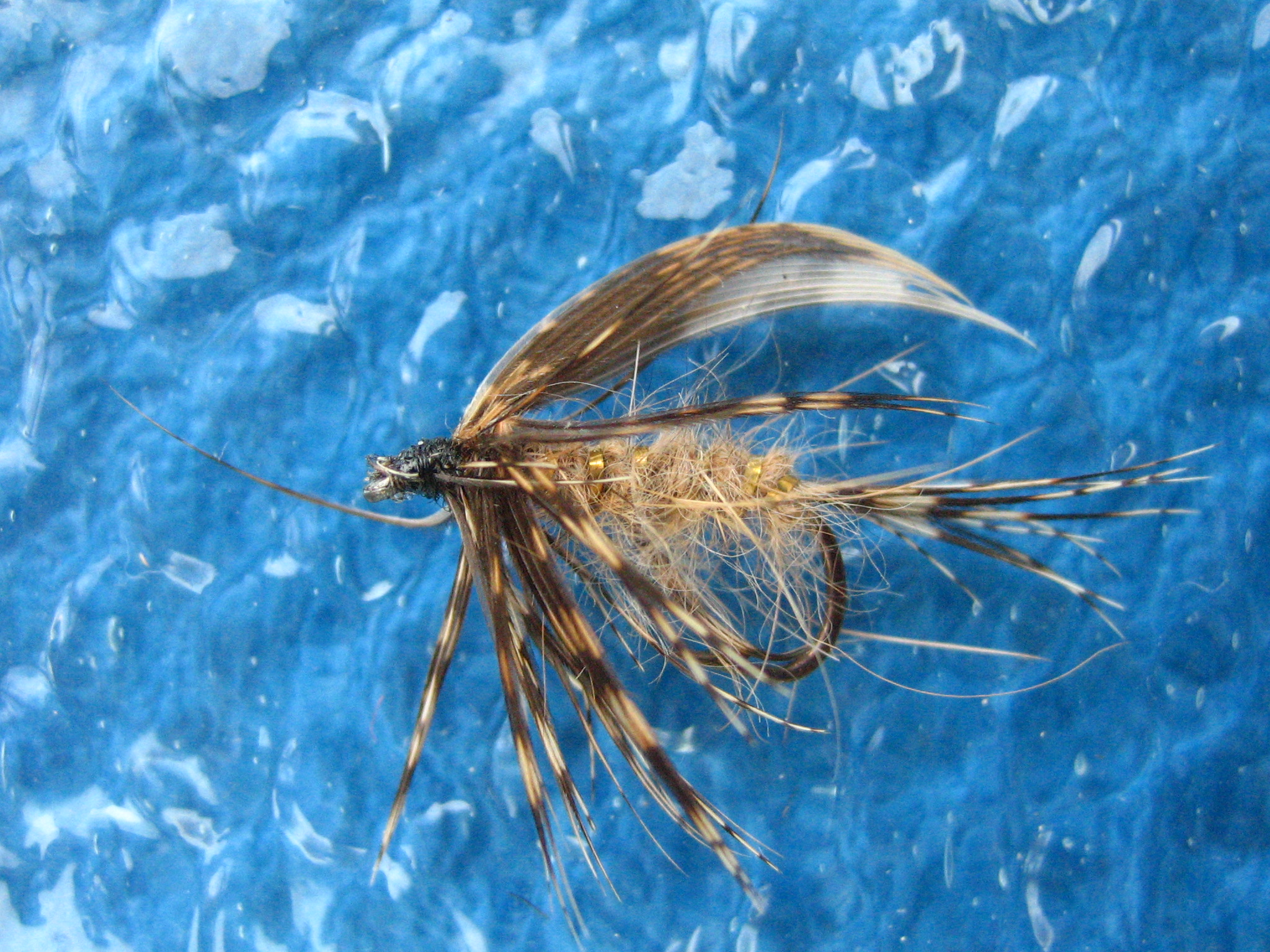 Březnovka - modifikace (March Brown)